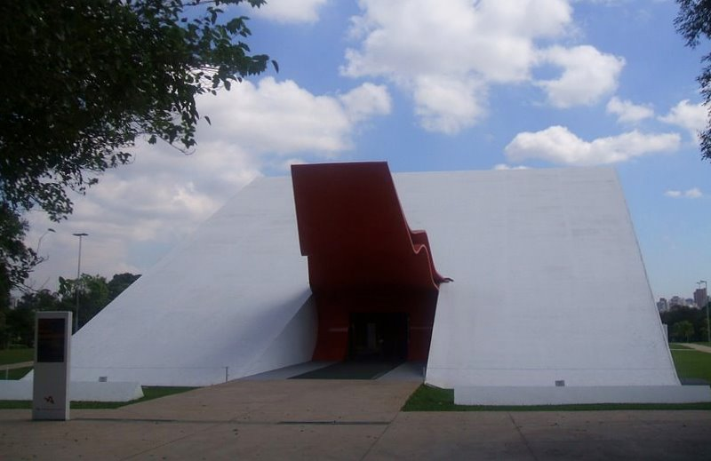 Auditório Ibirapuera, no parque homônimo de São Paulo, Brasil.